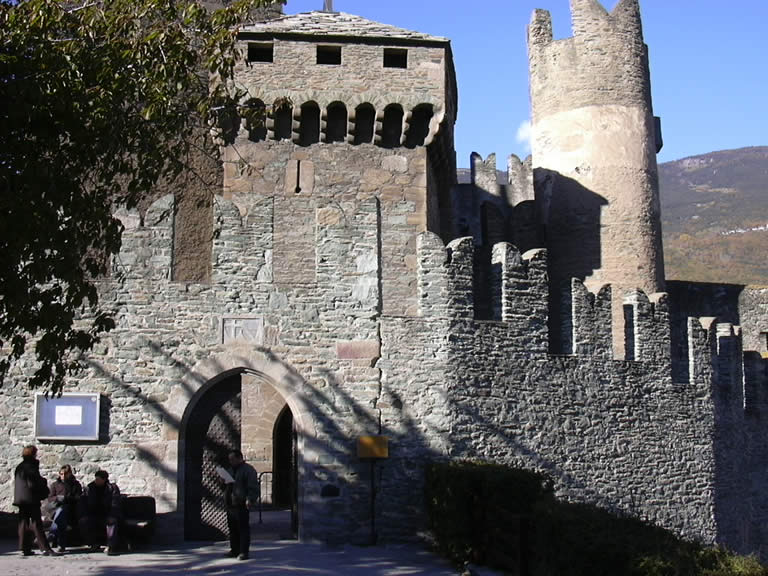 Castello di Fenis